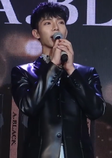 Erik tại một sự ở Thành phố Hồ Chí Minh vào ngày 21 tháng 3 năm 2020